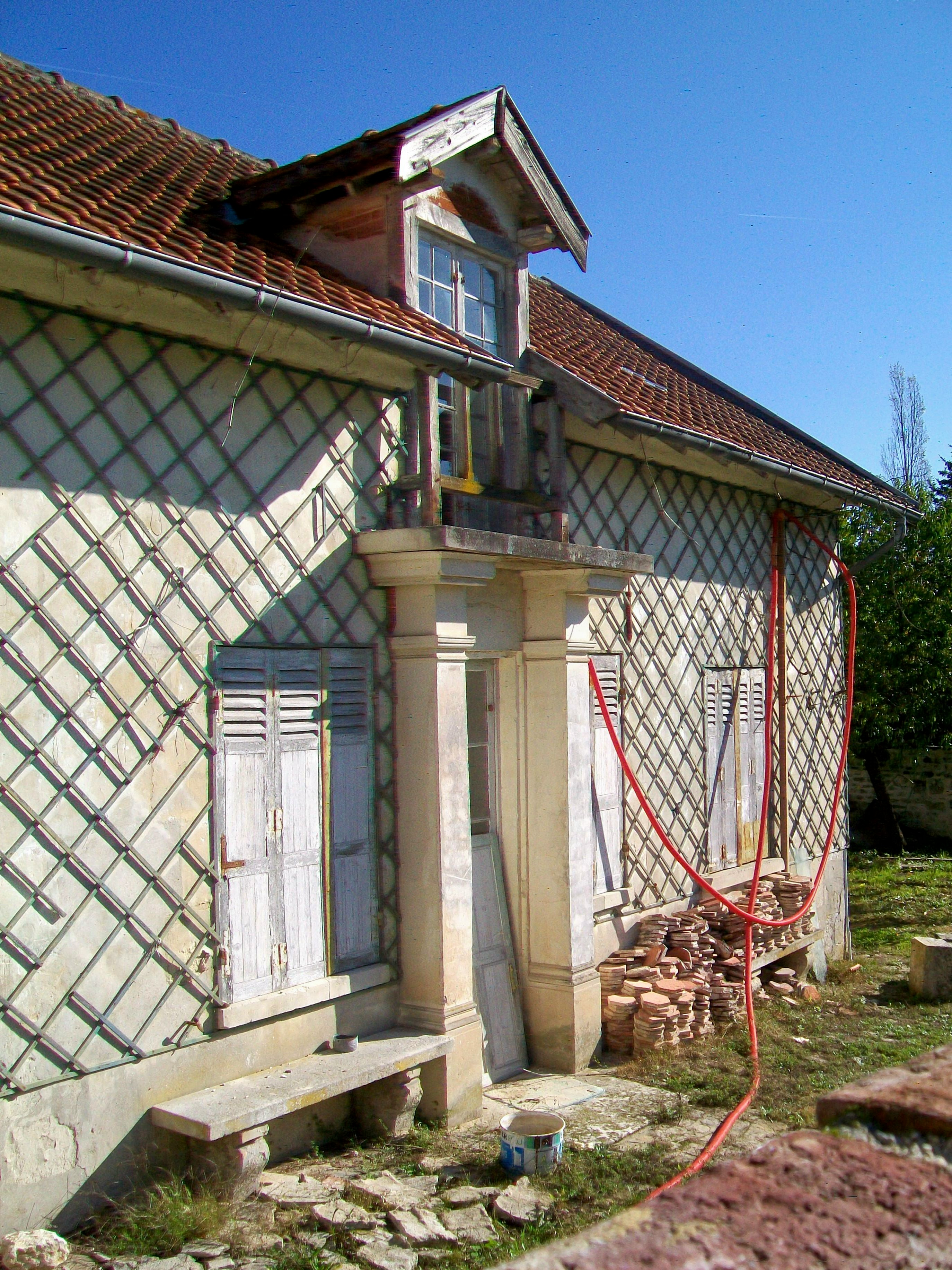 Entrée de la villa Sylvie, ancienne résidence secondaire d'Henri Barbusse et musée, partie ouest ; 4 chemin de la Gruerie.